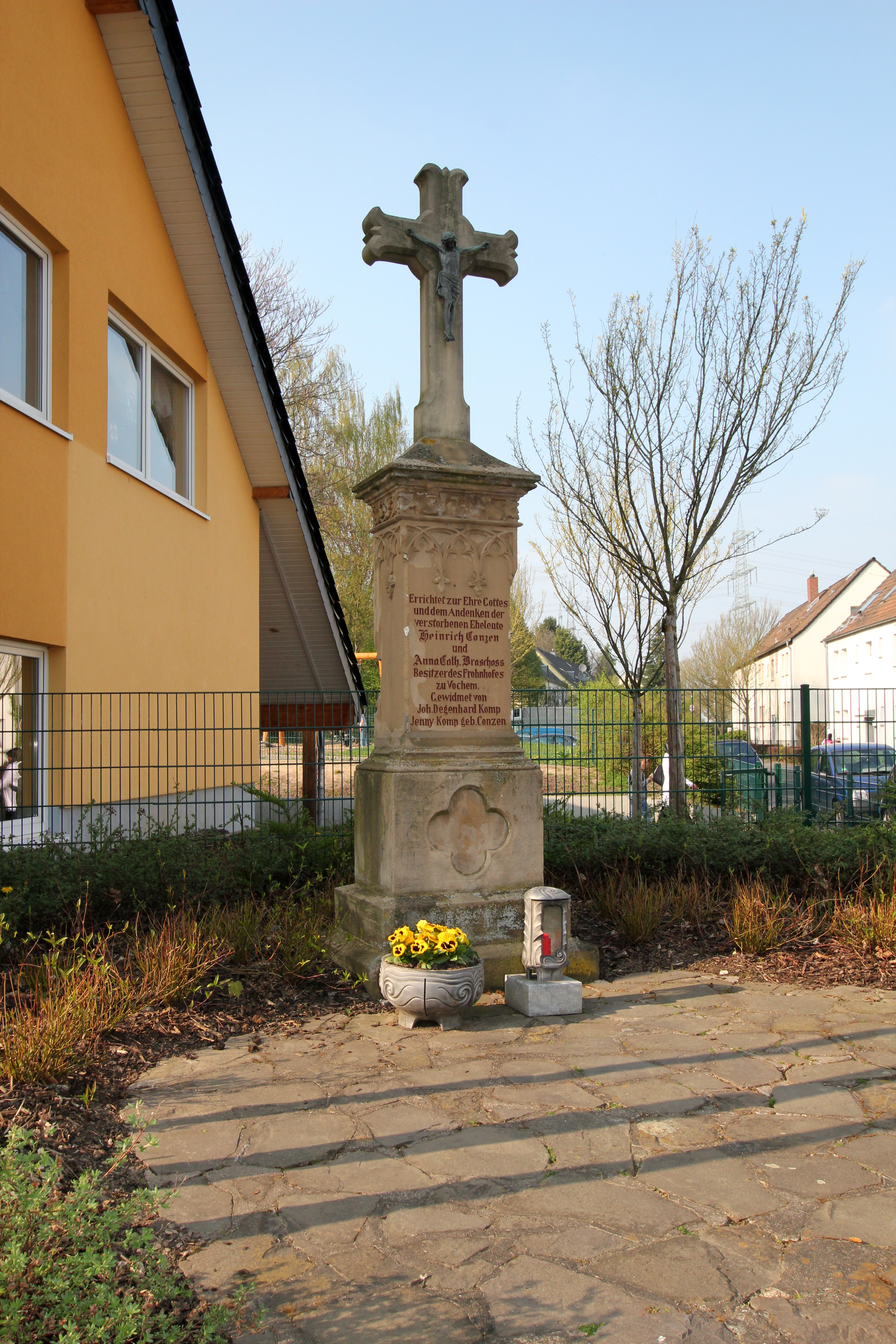 Brühl-Vochem, Gedenkkreuz an der Straße Zum Herrengarten